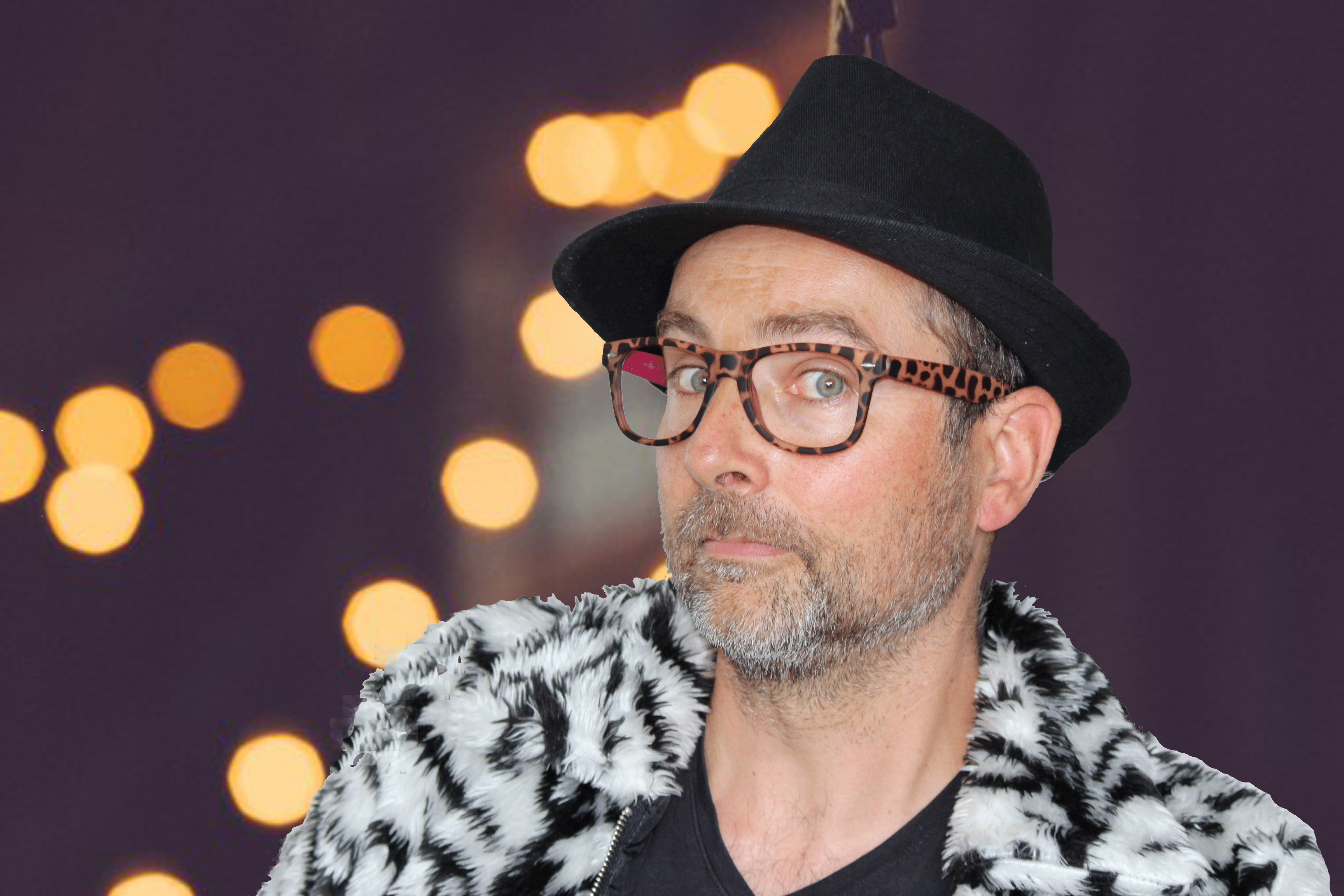 Mikee - Musiker aus der Schweiz